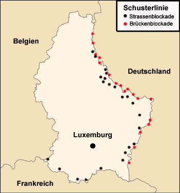 Die Schusterlinie (1940)